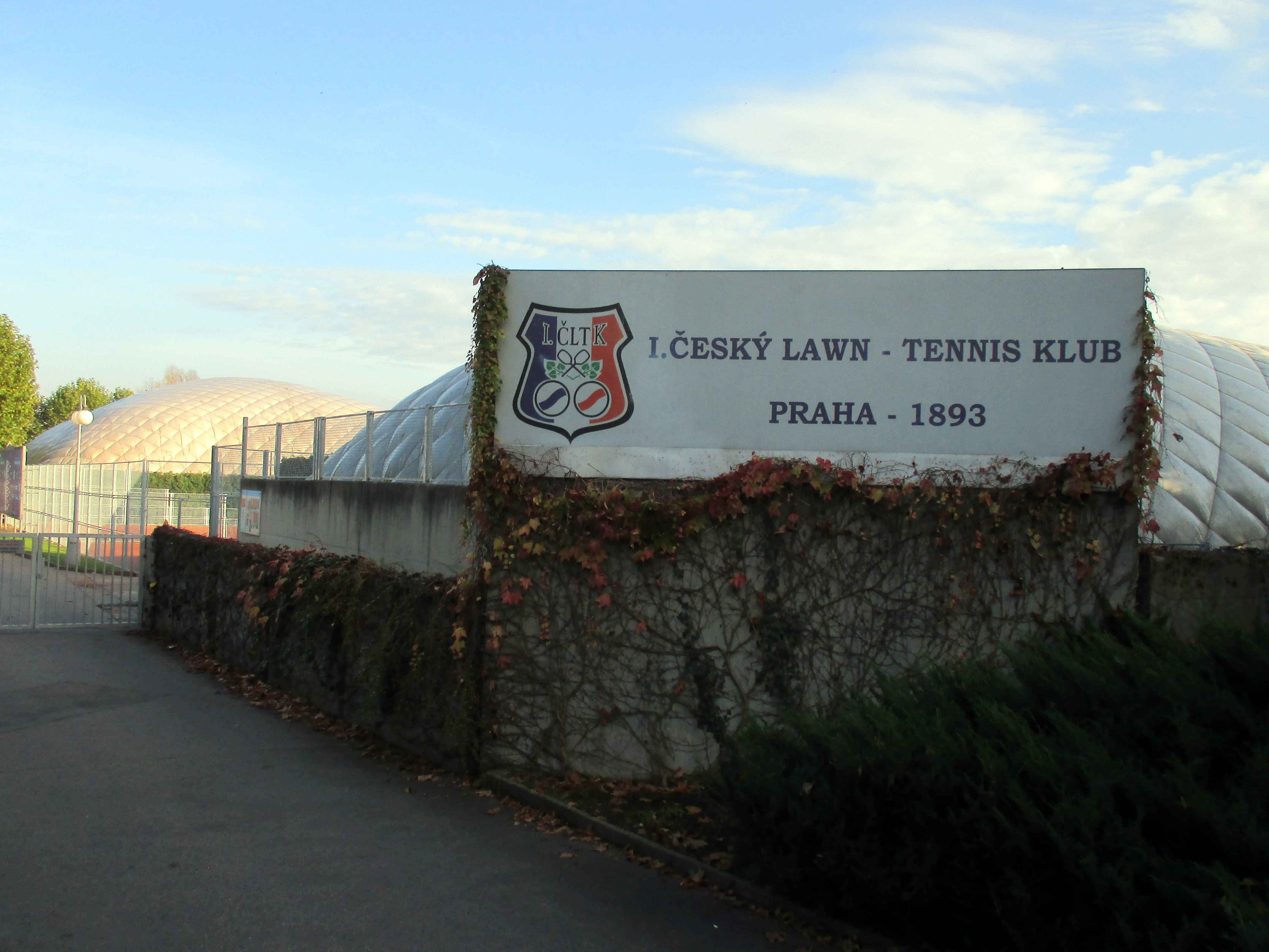 Blick auf das Eingangstor vom 1. Cesky Lawn - Tennis Klub in Prag.